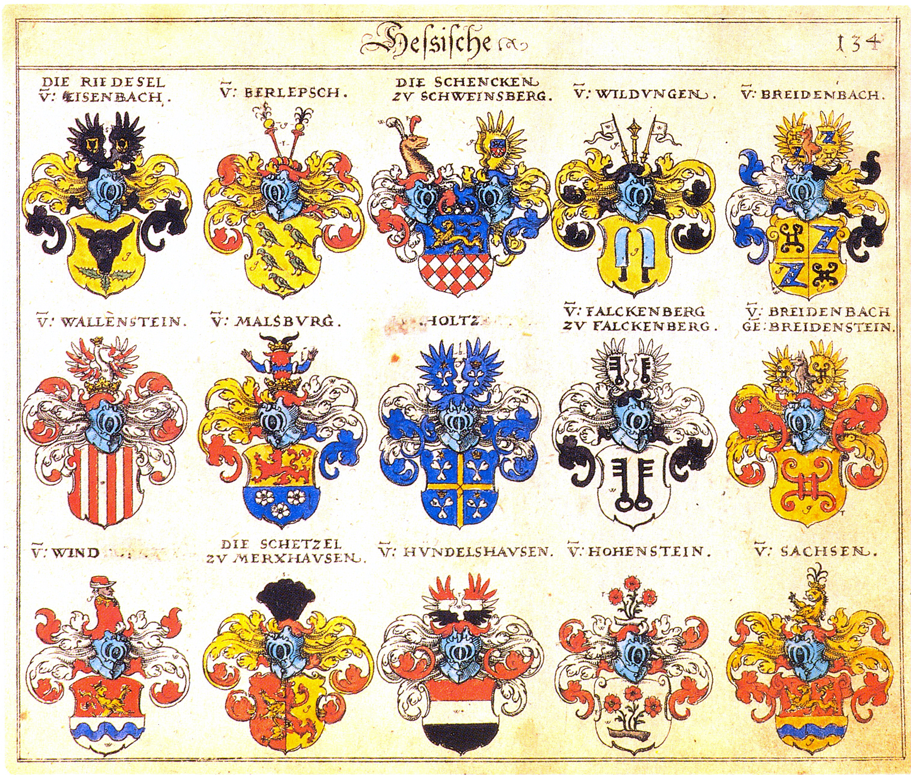 Johann Siebmacher: New Wappenbuch eingescannt aus: Horst Appuhn (Hrsg.), Johann Siebmachers Wappenbuch. Die bibliophilen Taschenbücher 538, 2. verb. Aufl , Dortmund 1989 Hessische Blatt 134